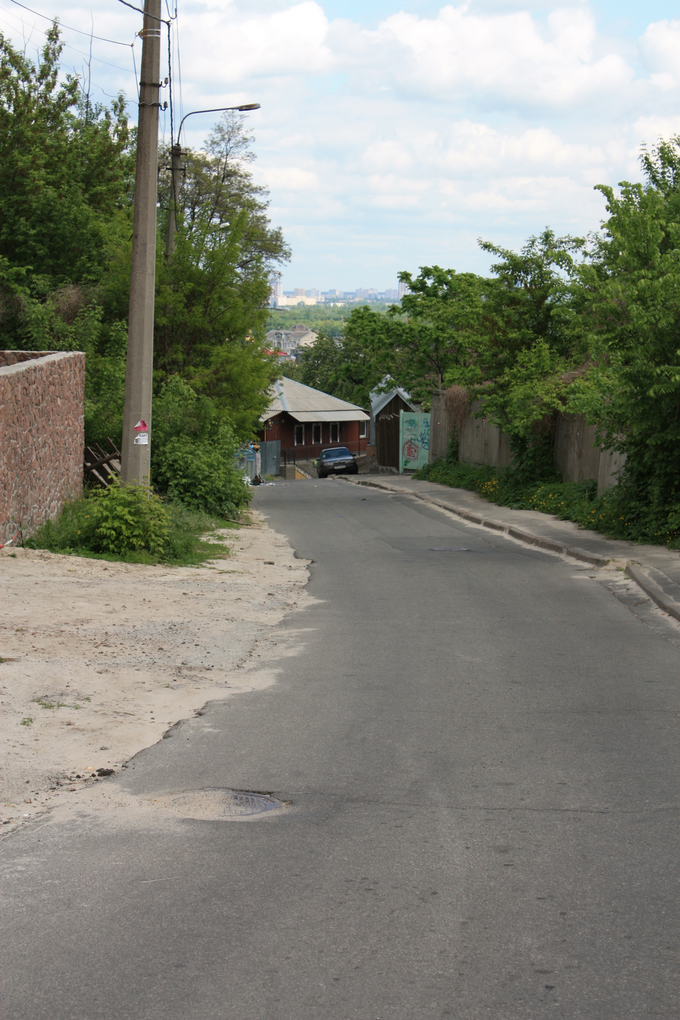 Вулиця Олегівська в Києві